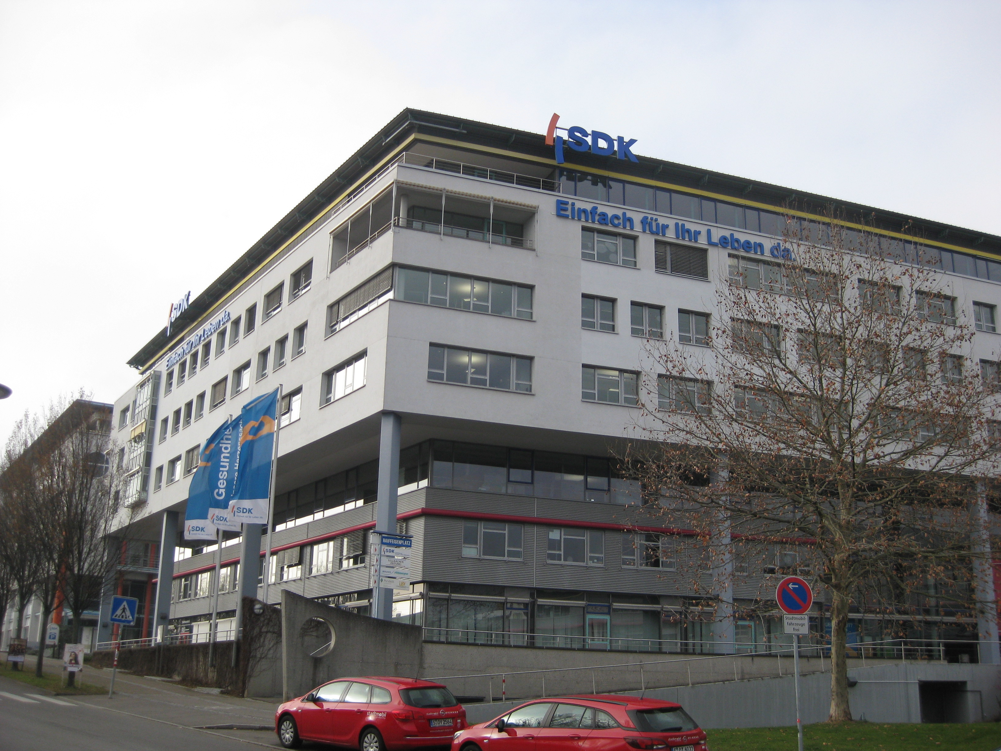 Gebäude der SDK Versicherungsgruppe am Bahnhof Fellbach